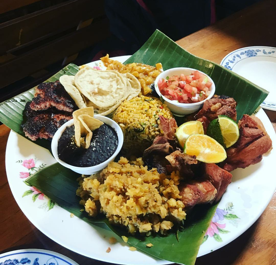 Versión jpg del archivo Archivo:Gallitos ticos.png